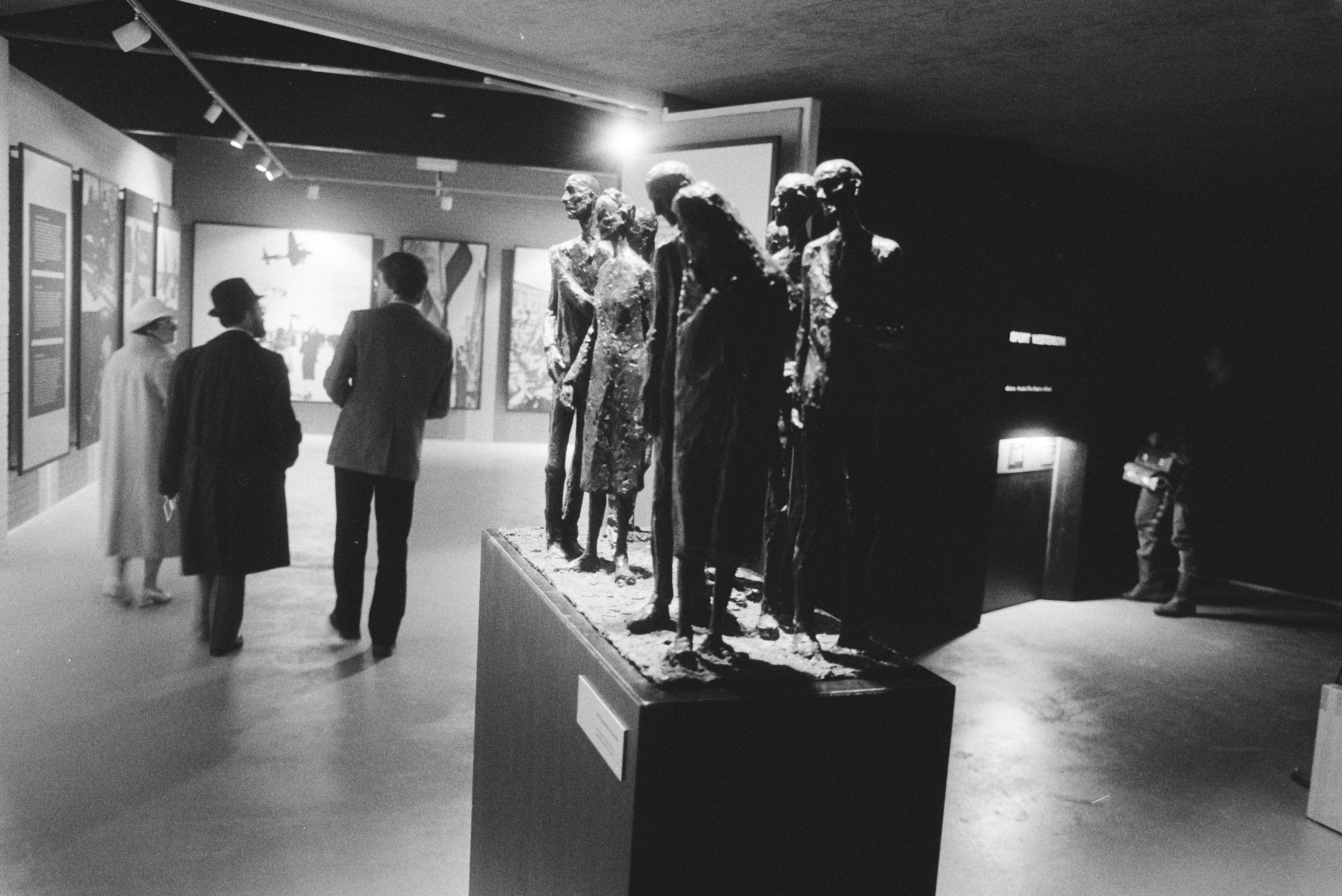 Collectie / Archief : Fotocollectie Anefo Reportage / Serie : Opening van het Herinneringscentrum Kamp Westerbork Beschrijving : openingen, concentratiekampen, musea, tentoonstellingen Datum : 22 maart 1983 Locatie : Drenthe, Westerbork Trefwoorden : concentratiekampen, musea, openingen, tentoonstellingen Fotograaf : Bogaerts, Rob / Anefo Auteursrechthebbende : Nationaal Archief Materiaalsoort : Negatief (zwart/wit) Nummer archiefinventaris : bekijk toegang 2.24.01.05 Bestanddeelnummer : 932-5402